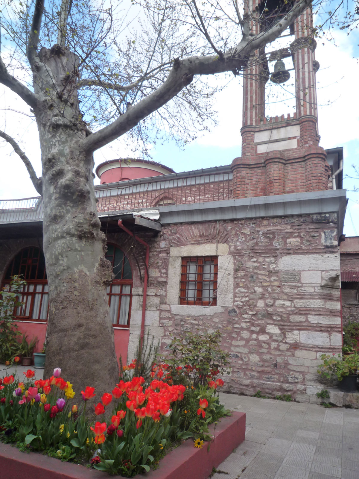 Patio interior del complejo